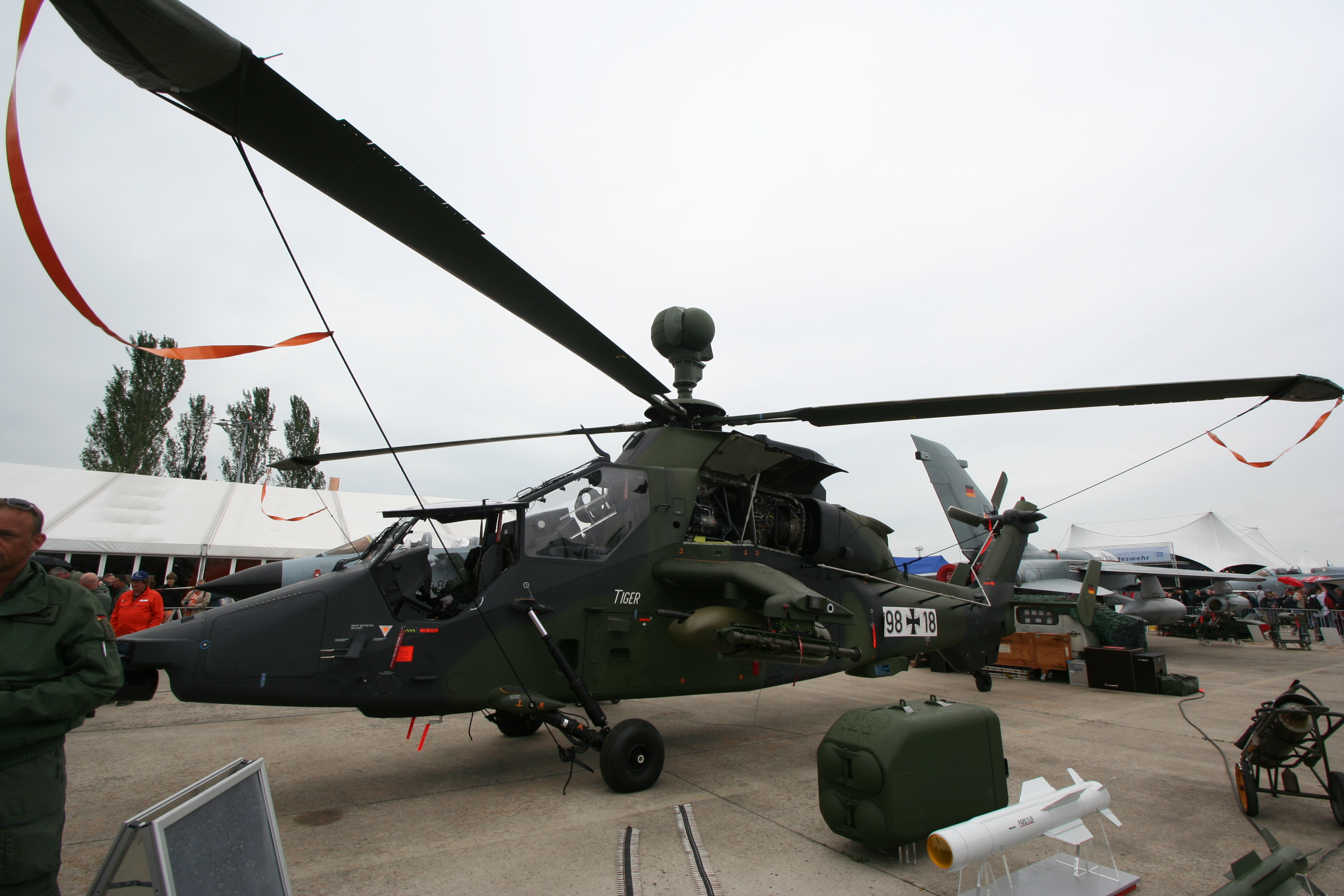 ILA 2010 - Eurocopter EC-665 Tiger